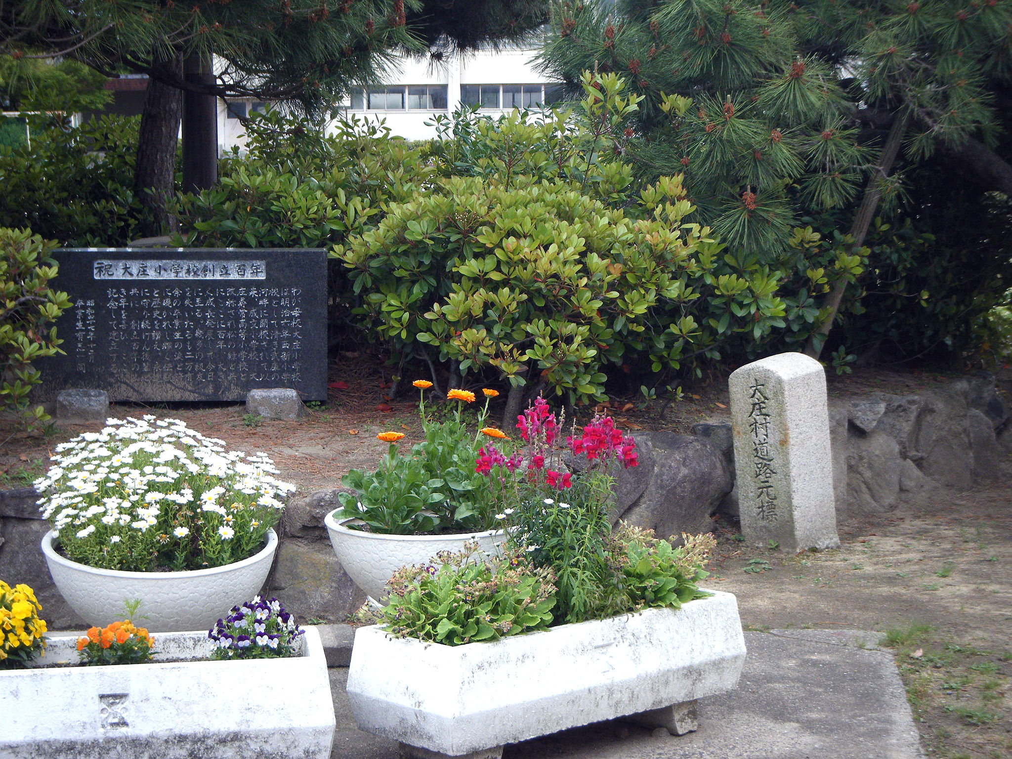 大庄村道路元標 大庄小学校校庭 校門前より撮影